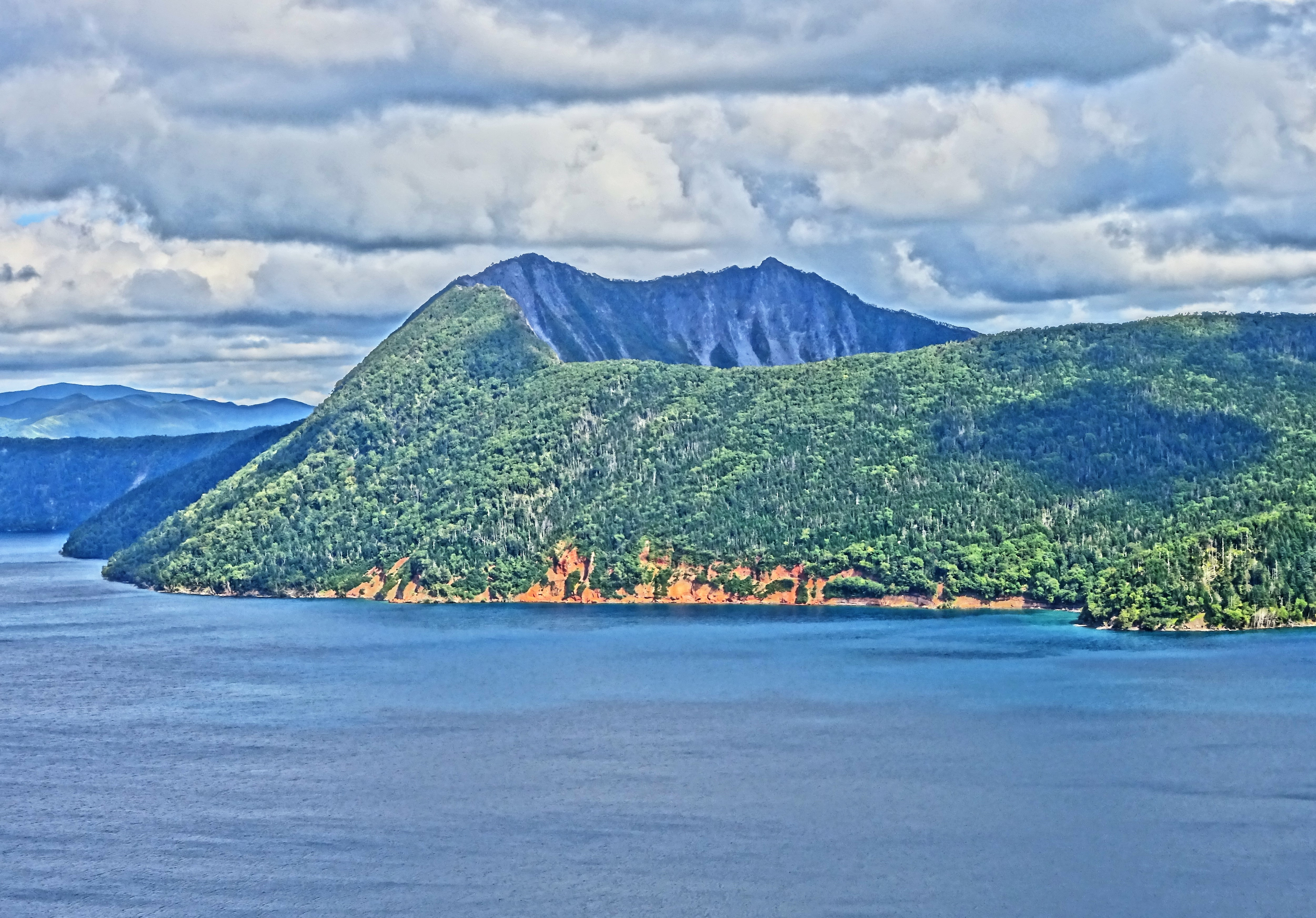 摩周岳の爆裂火口。第一展望台より。カムイヌプリ。